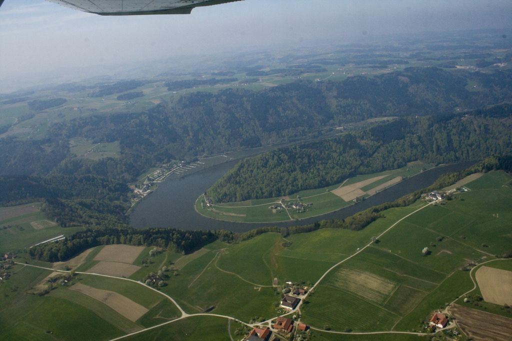 Luftaufnahme Schlögener Schlinge aufgenommen bei einem Rundflug in einer Cessna